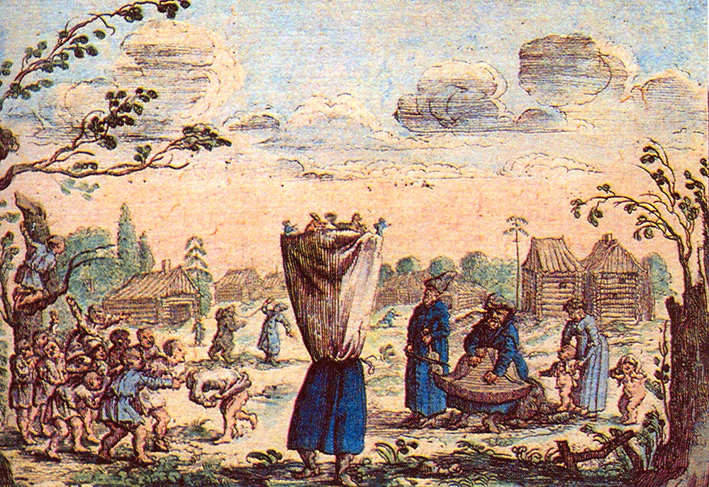 Кукольник. «Их плясуны — вожаки медведей имеют при себе и таких комедиантов, которые, между прочим, при помощи кукол, устраивают представление (у голландцев оно называется Kiucht). Эти комедианты завязывают себе вокруг тела одеяло и расправляют его вверх вокруг себя, изображая таким образом переносный театр, с которым они могут бегать по улицам и на котором в то же время могут происходить кукольные игры...»